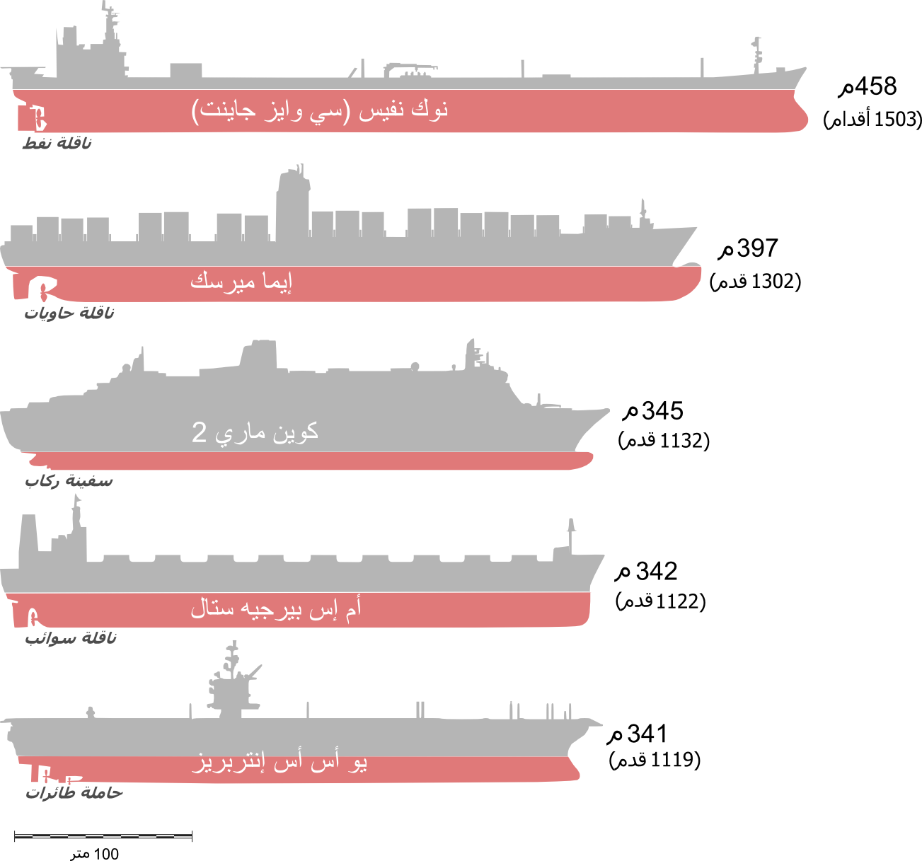 مُقارنة بين بعض أطول السفن في العالم (نوك نفيس، إيما ميرسك، آر إم إس كوين ماري 2، أم أس بيرجيه ستال و يو أس أس إنتربريز). تمثل الألوان قعر السفينة والقسم العلوي منها. أما المقاييس فهي نفسها الواقعية. إن هذه السفن ليست "أضخم خمسة" بواخر في العالم، لكنها الأضخم في فئتها ونوعها. لا تزال نوك نفيس أضخم سفينة شُيدت على الإطلاق، وإيما ميرسك أضخم السفن العاملة.